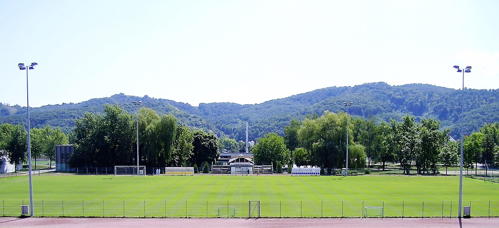 Kazincbarcika, Városi Sporttelep, a Kazincbarcikai Sport Club (KBSC) jogelődjének a Kazincbarcikai Vegyész SE (KVES) labdarúgó csapatának a pályája.